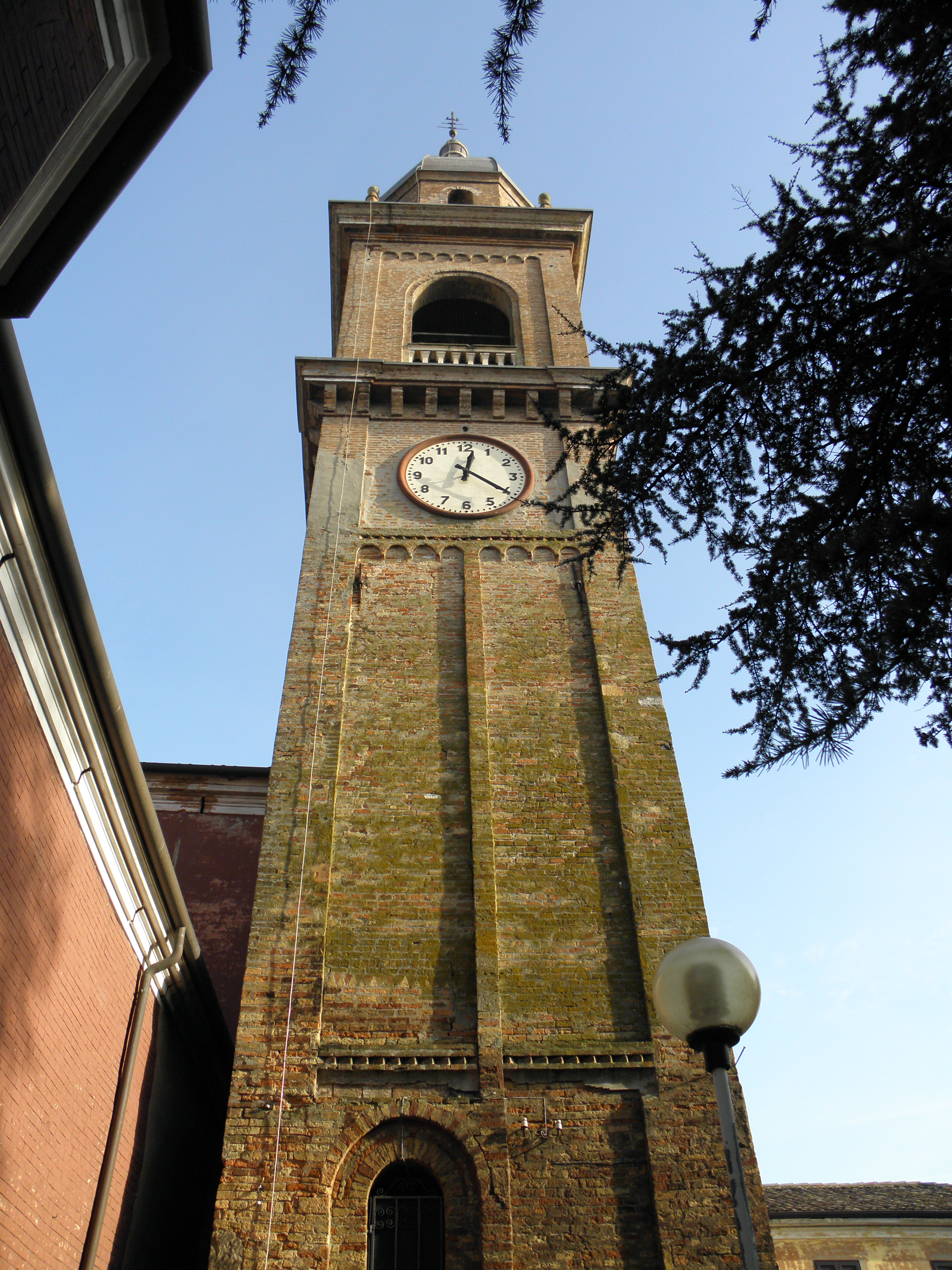 Formignana, il campanile della chiesa di Santo Stefano, vista lato ovest.